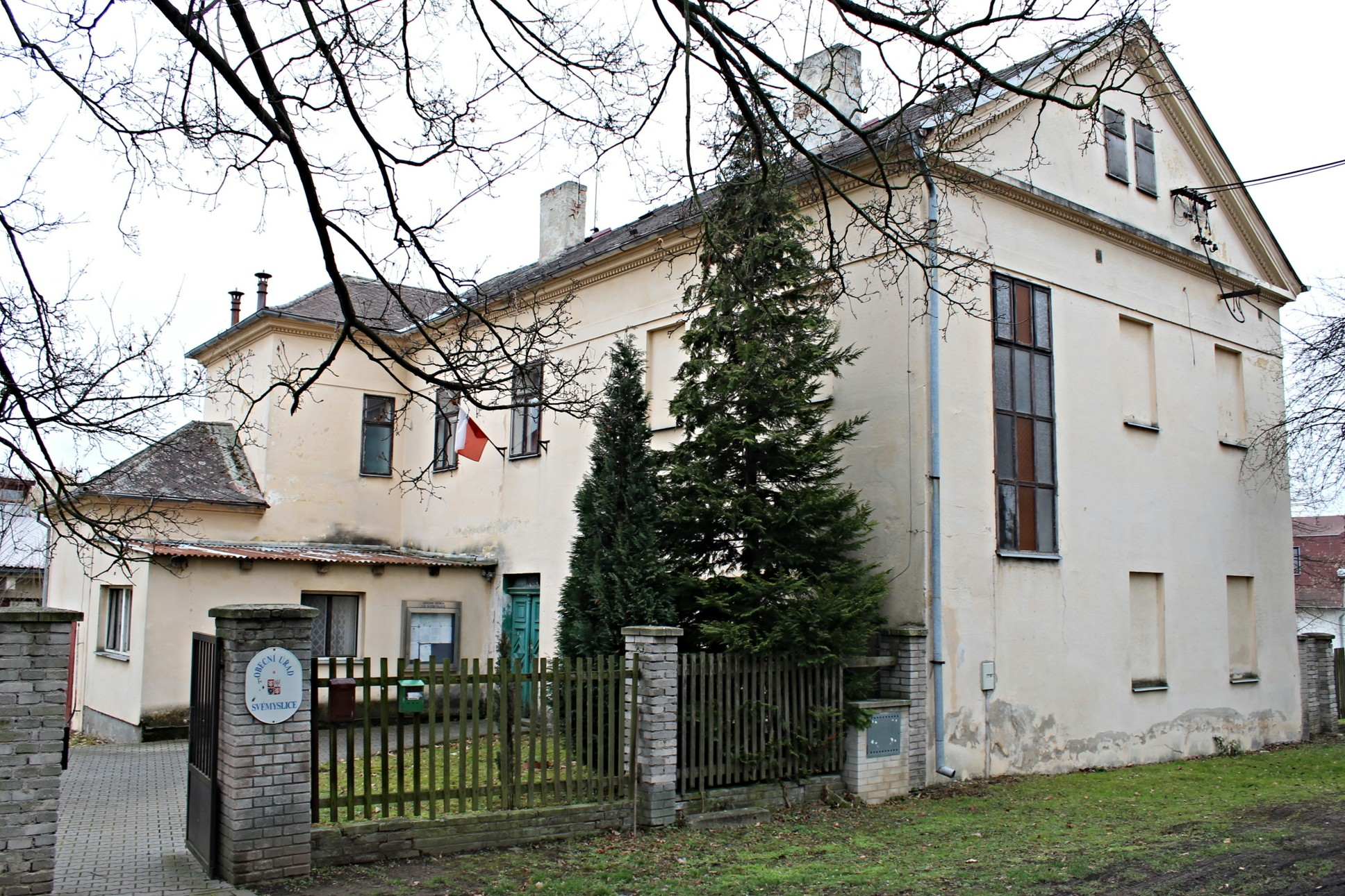 Svémyslice, náves u kostela